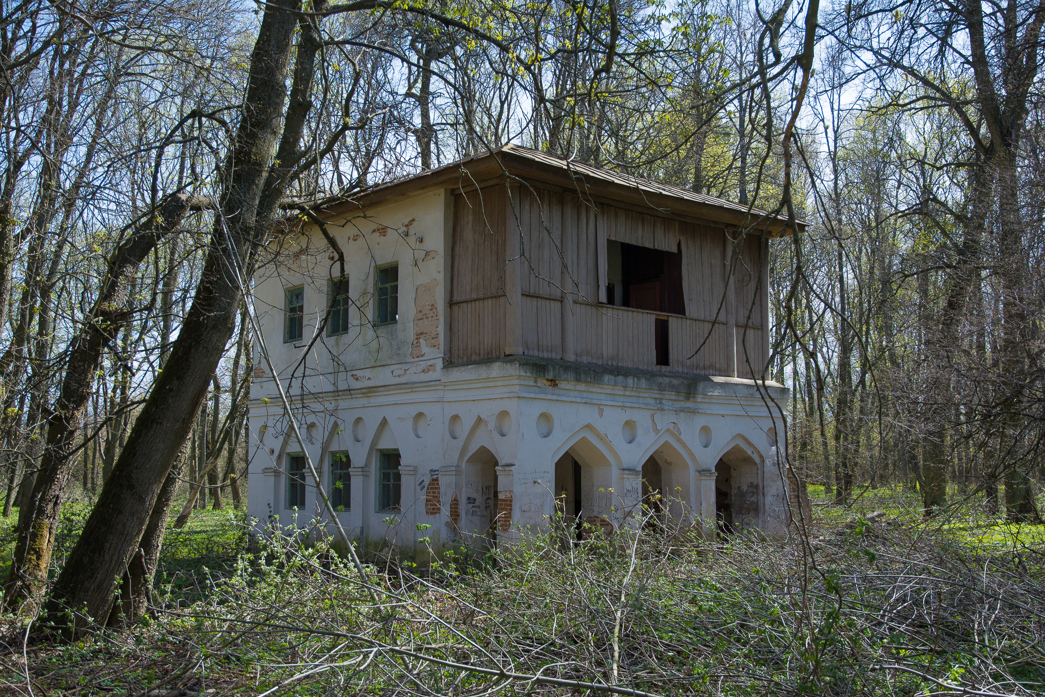 Скарбниця (мур.), Тиниця, вул.Матросова, 3